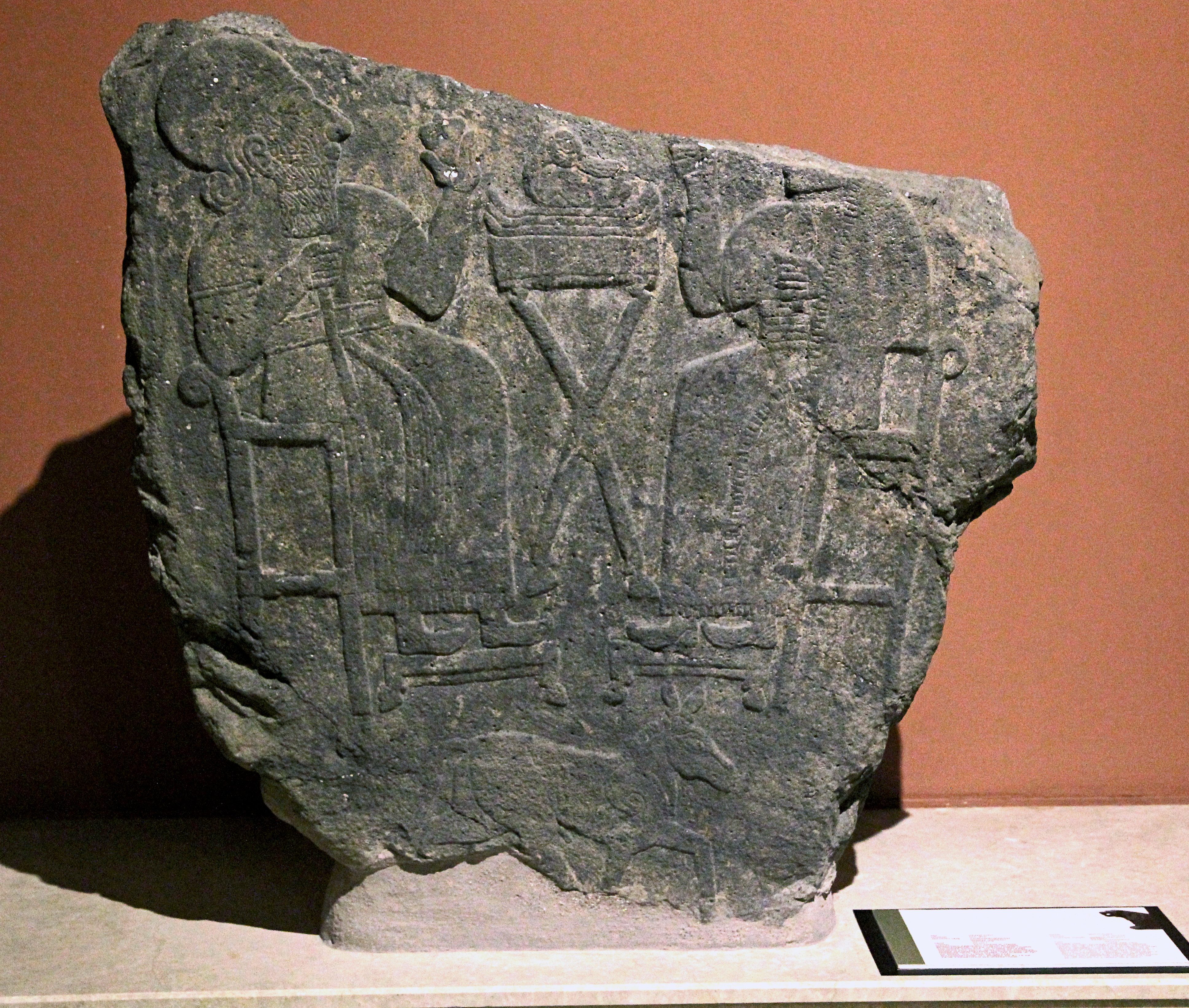 Archäologisches Museum Kahramanmaraş, Türkei, späthethitisches Relief mit Speiseszene, Hawkins-Nummer Maras 12